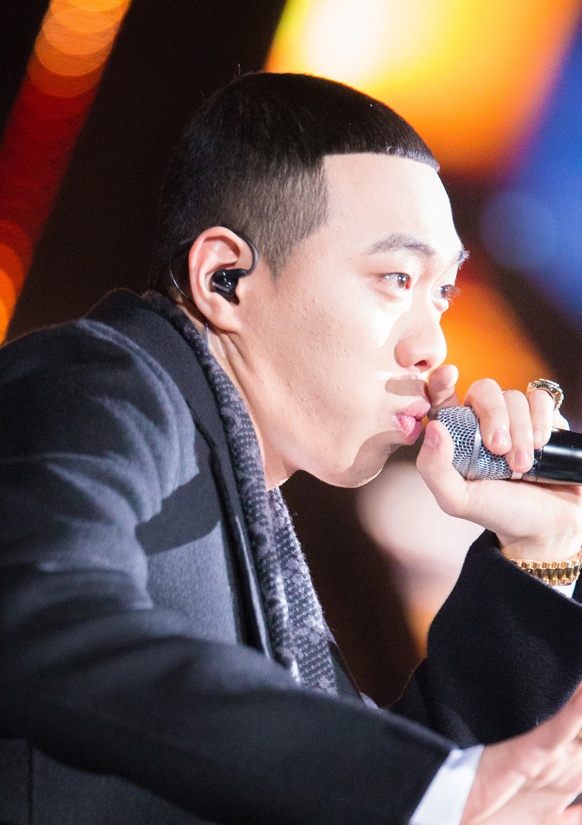 20161119 비와이 멜론뮤직어워드